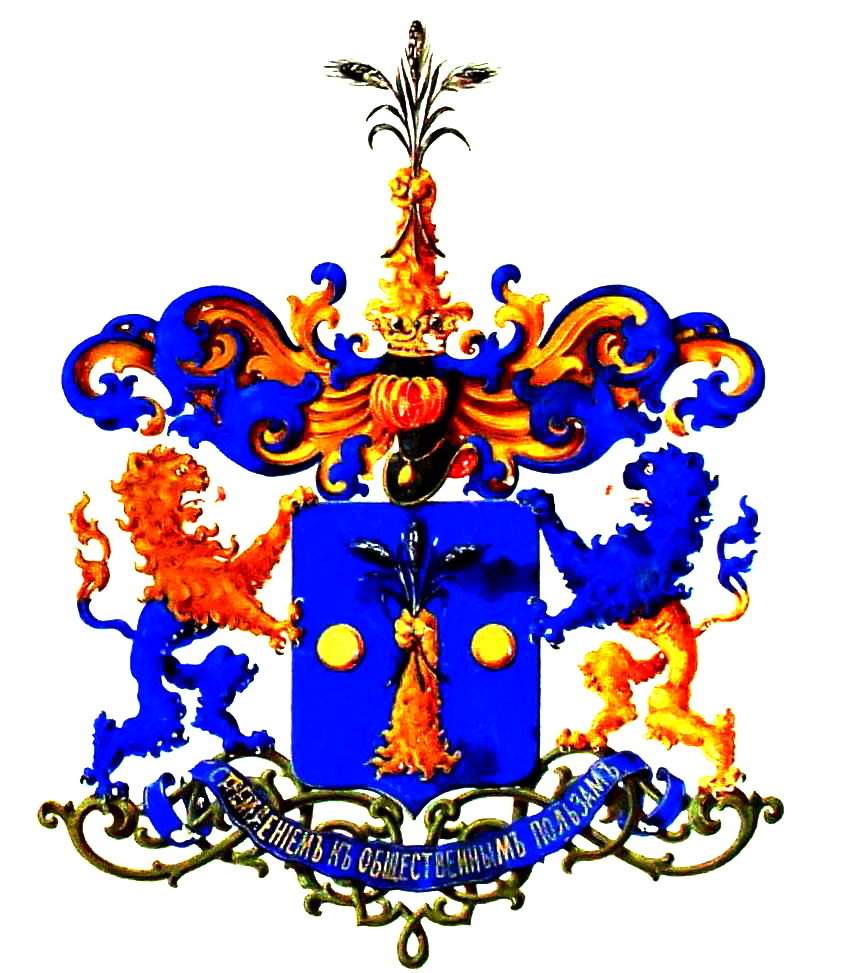 Герб нового дворянского рода Терещенко (от 1870)